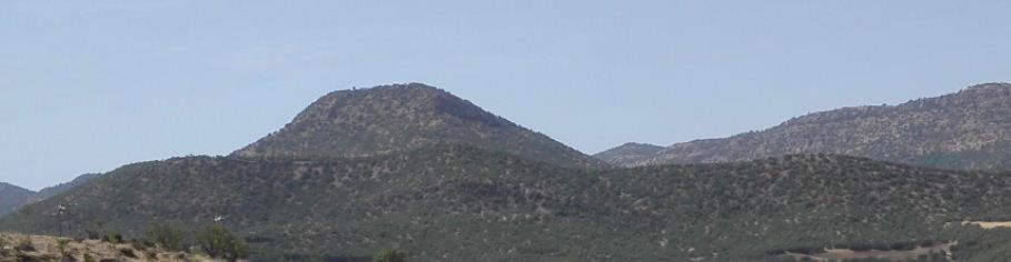 قُته بالیله